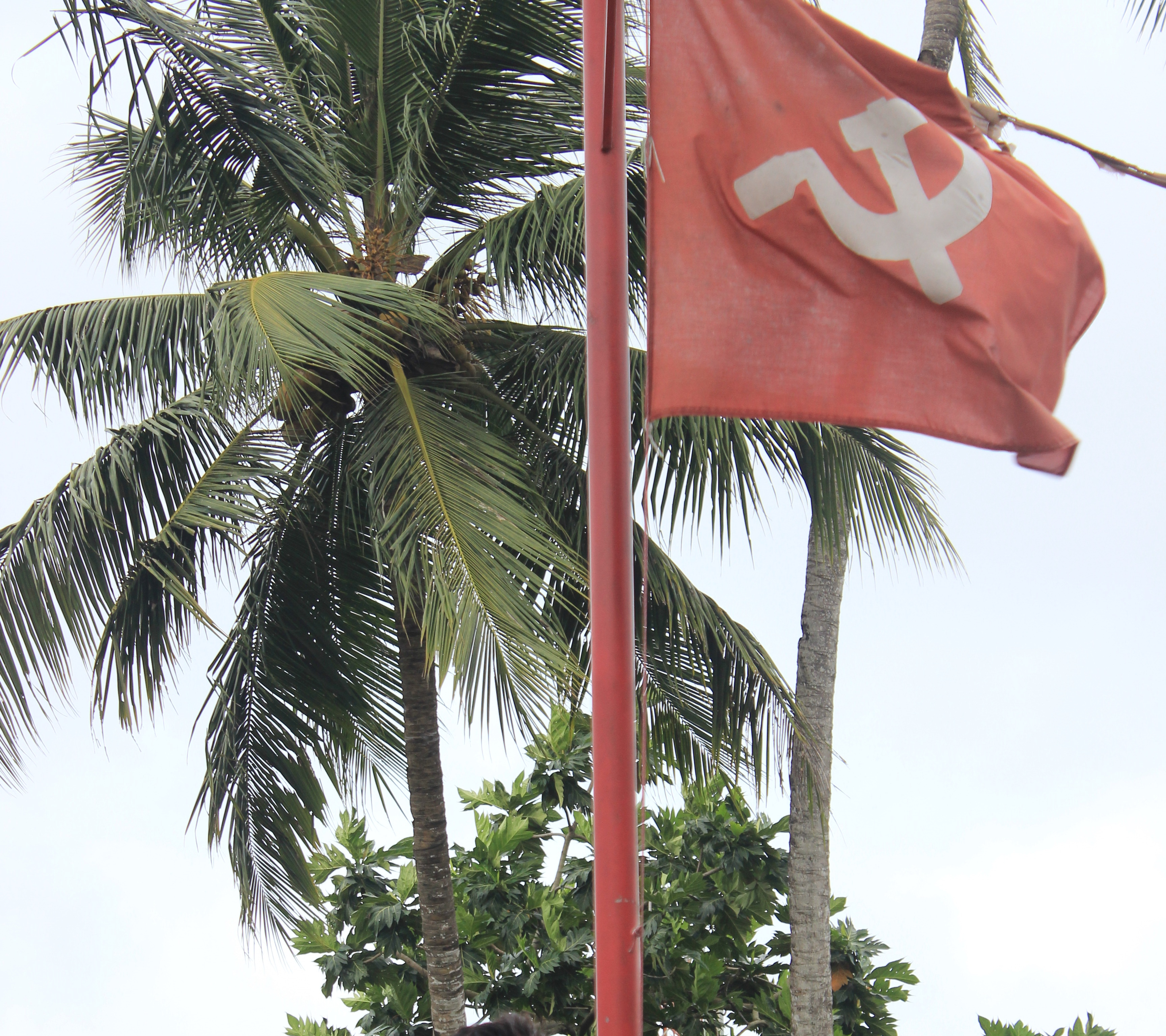 kuriyathi, killiyar theeram